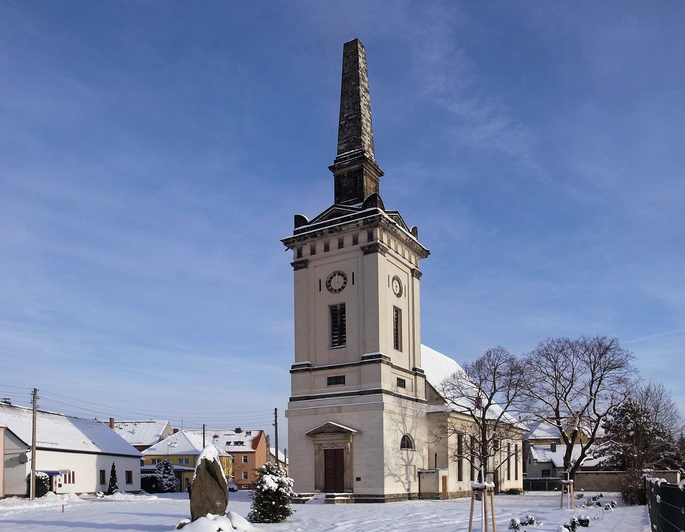 St.Bartholomäi Kirche Dessau-Waldersee, ehemals Jonitz (2010)